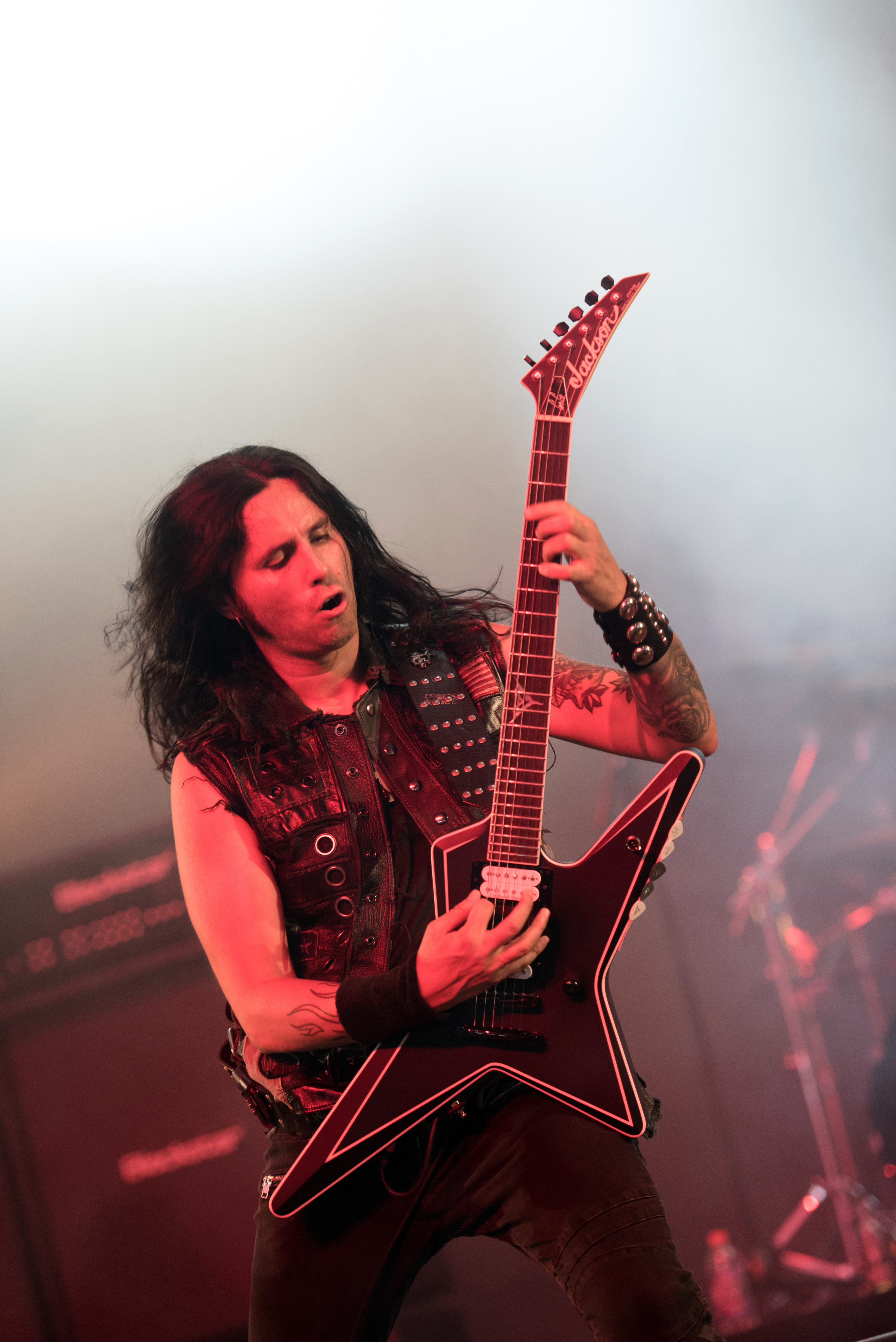 Firewind beim Wacken Open Air 2018